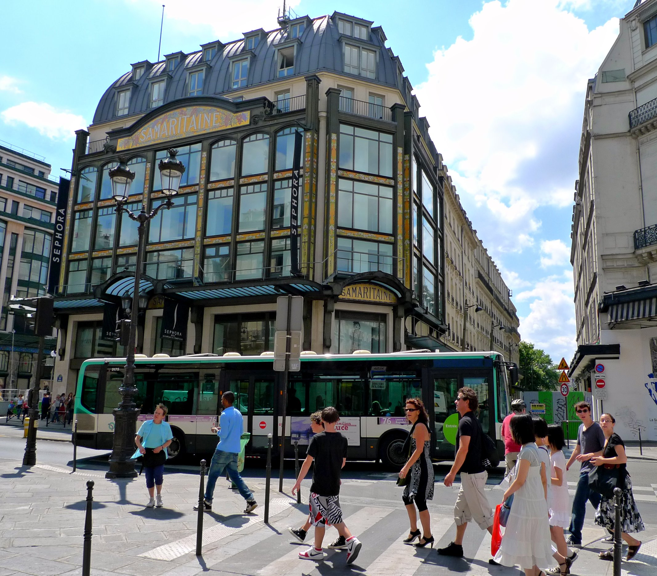 La Samaritaine